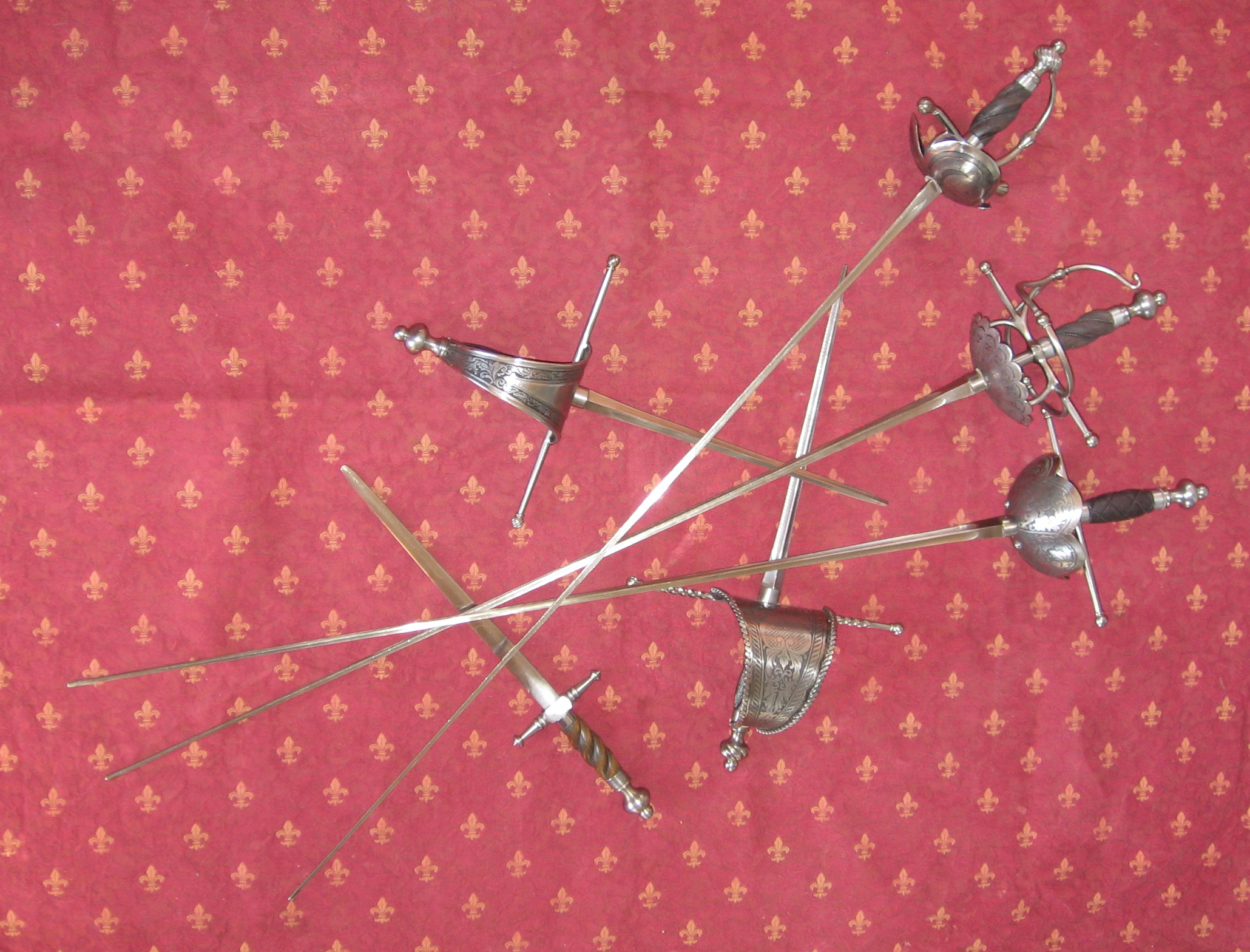 Rapières et dagues de l'association La Dague Pourpre en Vendée.